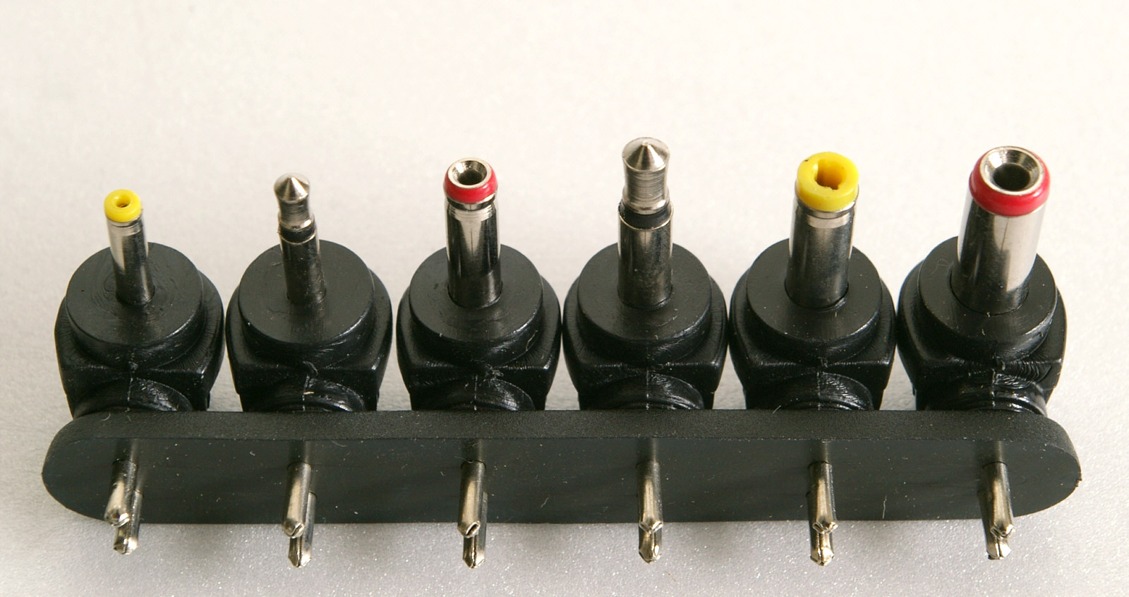 Verschiedene Klinken- und Hohlstecker-Adapter zum Anschluß batteriebetriebener Kleingeräte an ein Steckernetzteil